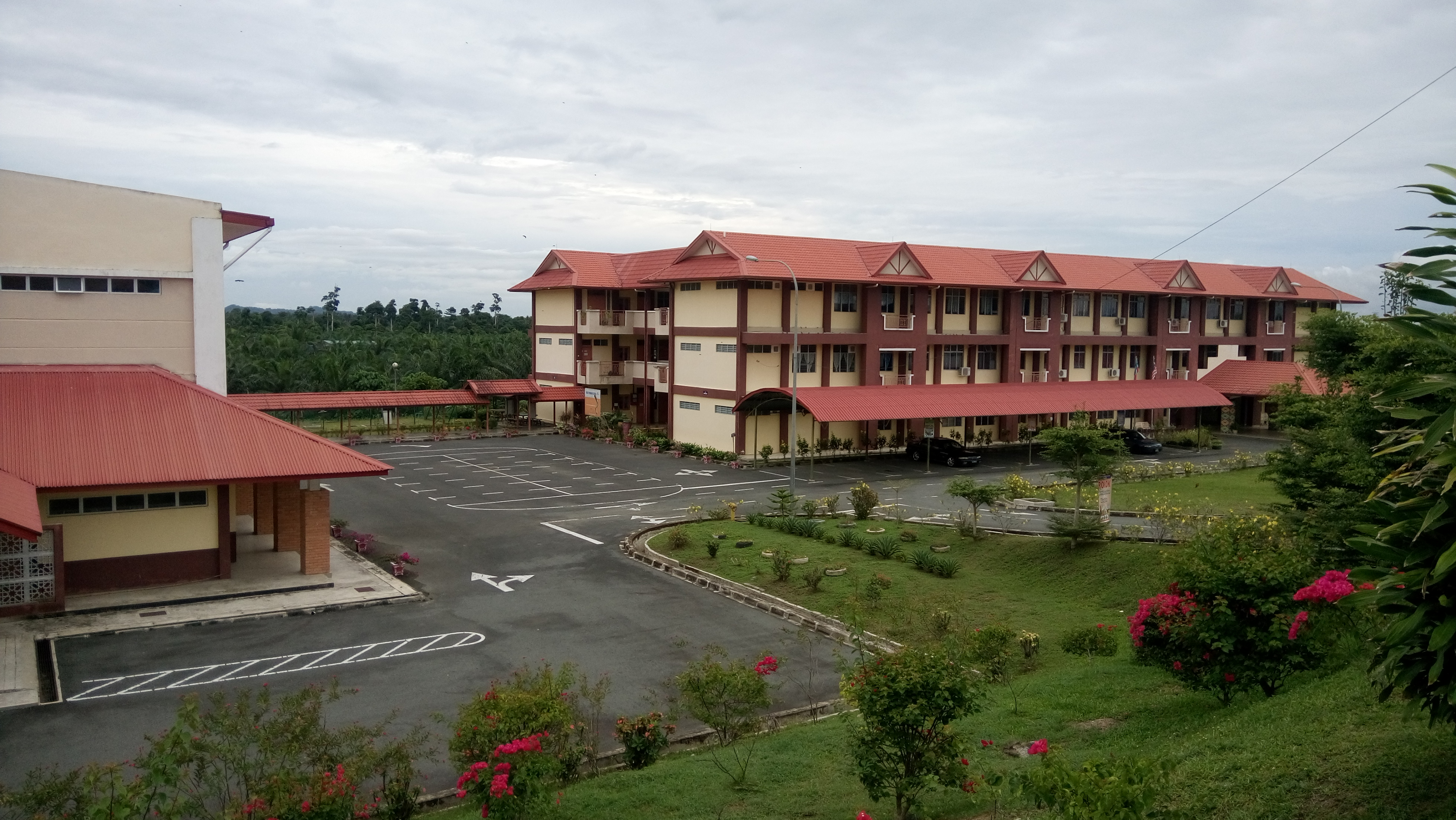 Sekolah di Lahad Datu